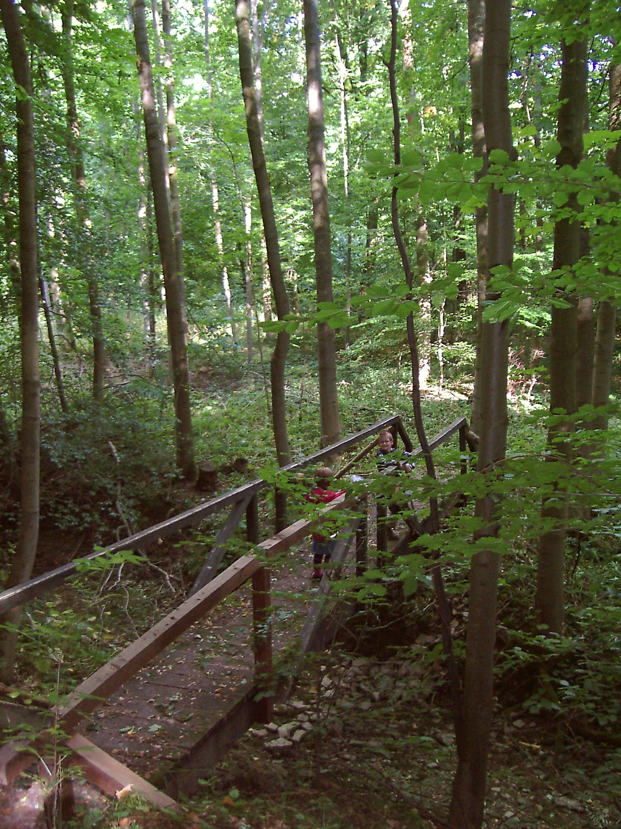 Steingraben im Schaftal im Volkenrodaer Wald. Das Schaftal ist eines der längsten Trockentäler Thüringens.